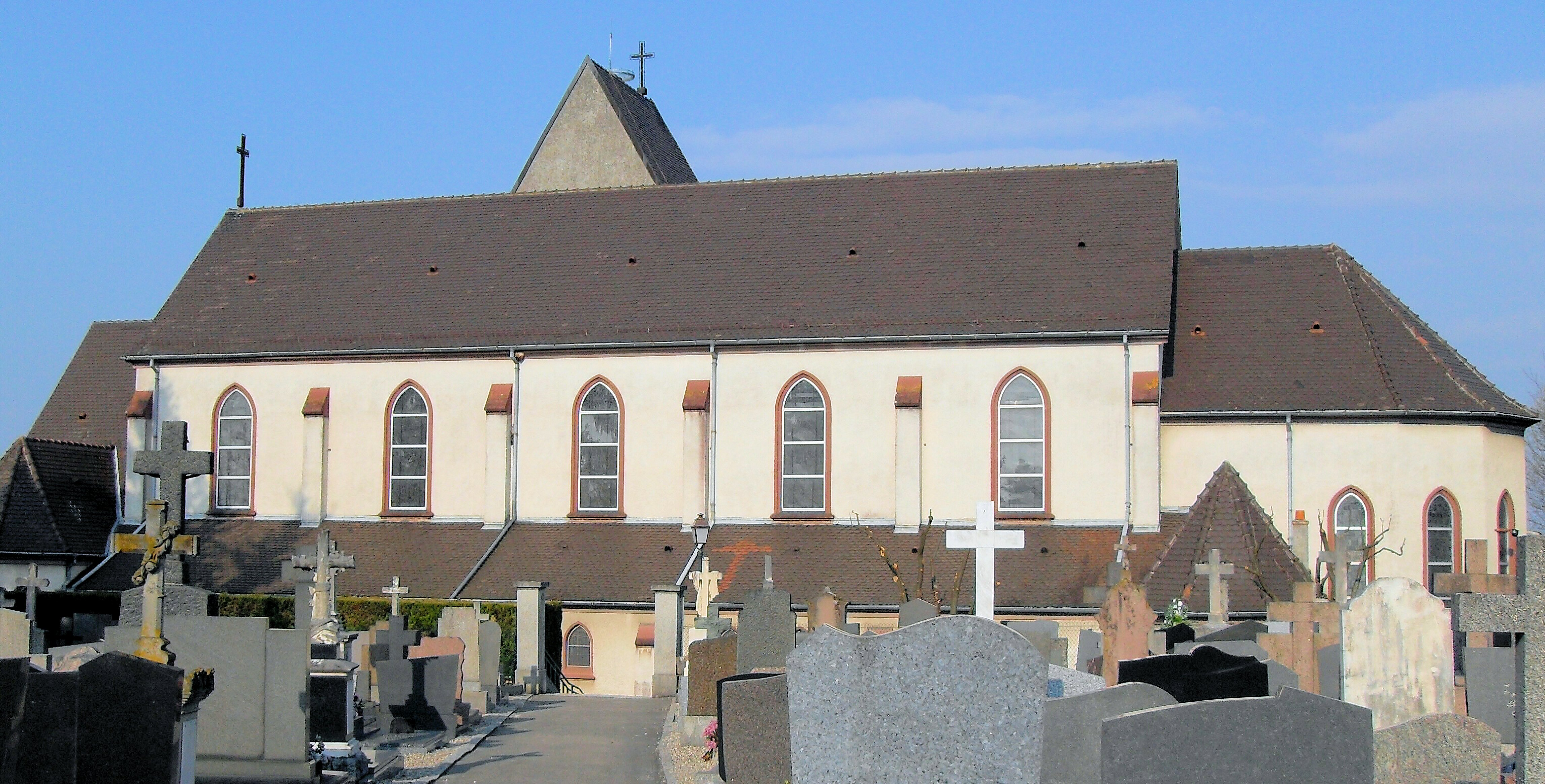 L'église Saint-Georges à Bartenheim